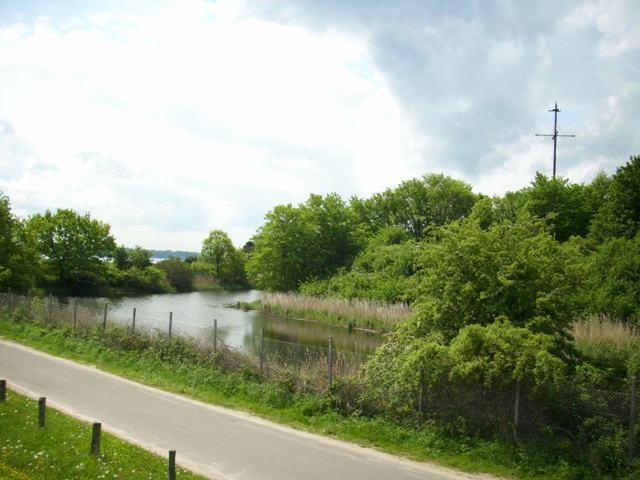 Fæstningen Christianspris/Frederiksort